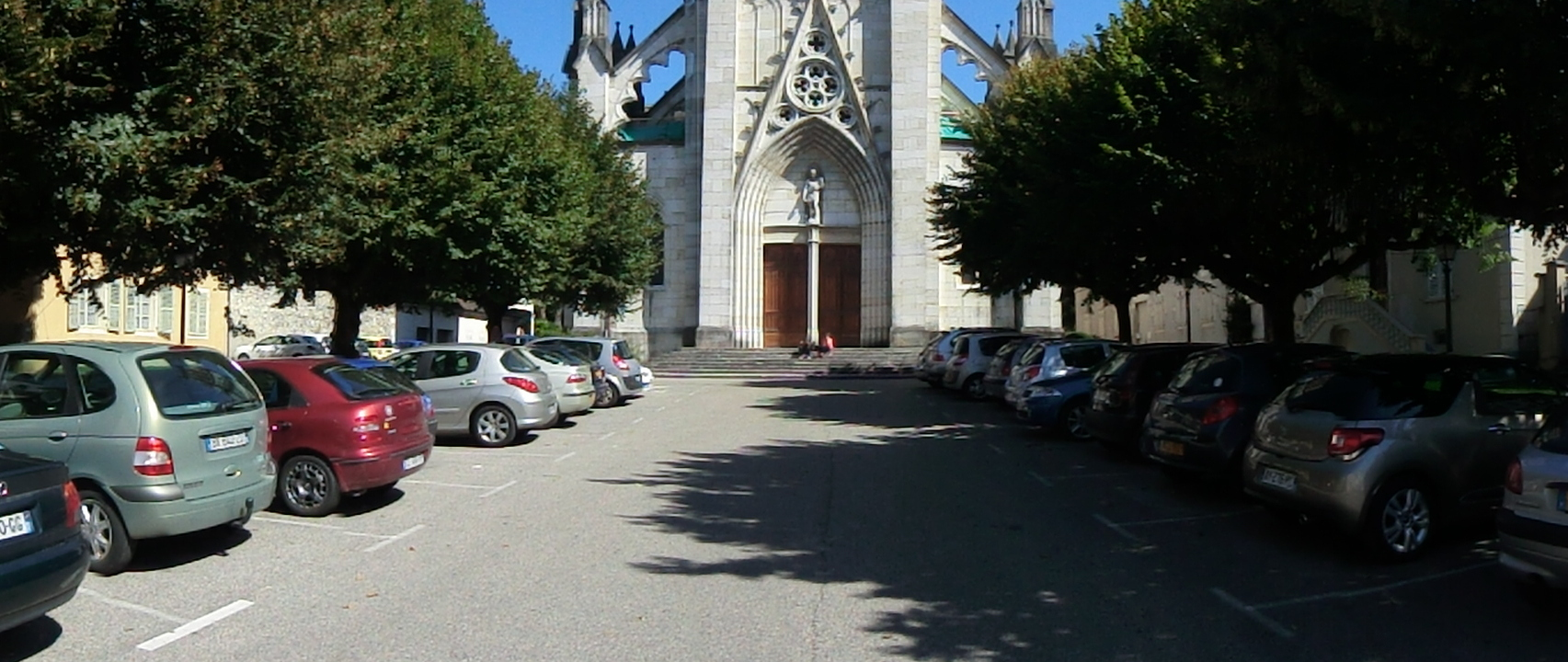 Pplace de la Cathédrale à Belley.